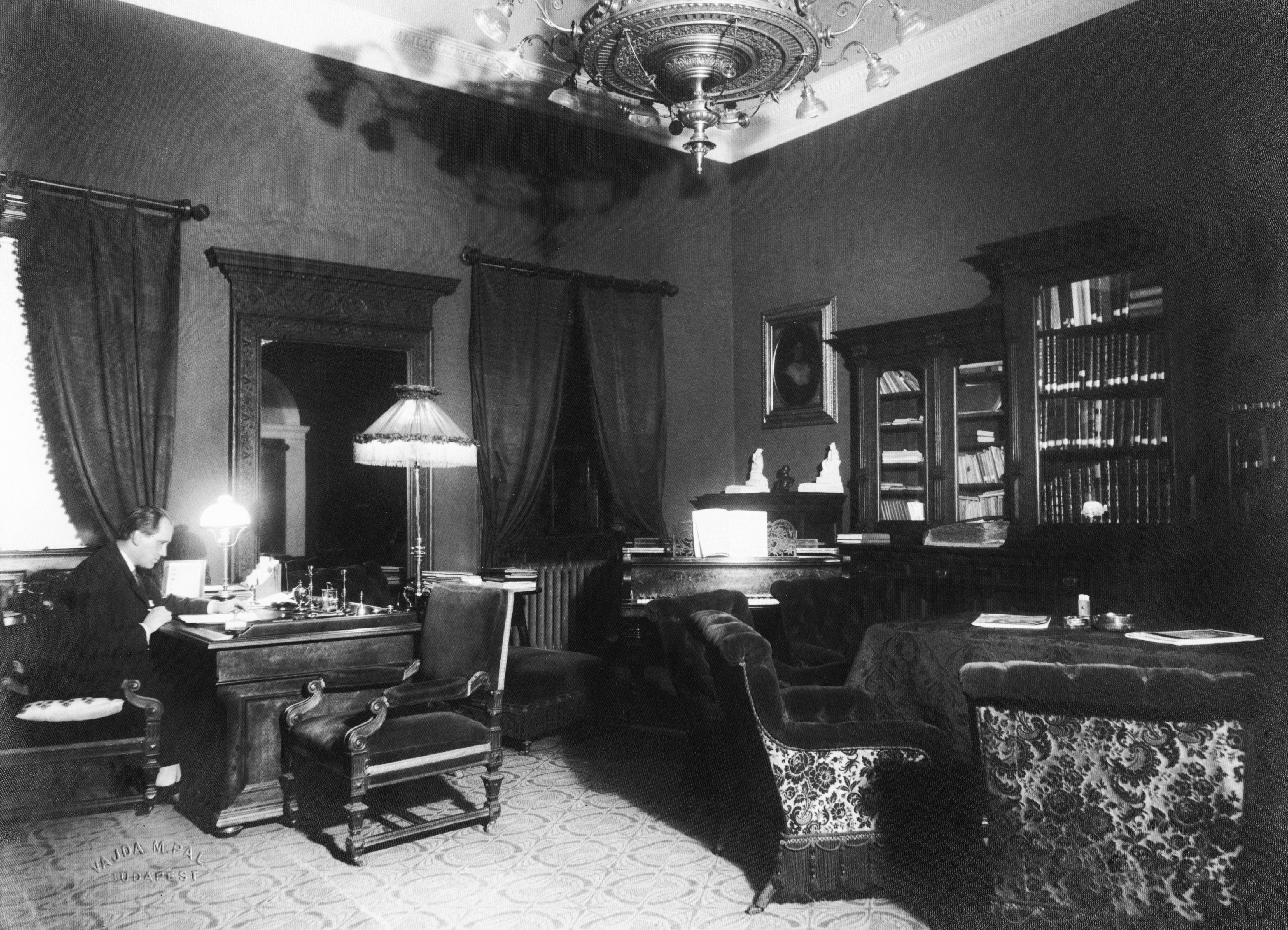 Radnai Miklós, az Operaház igazgatója, dolgozószobájában. Location: Hungary, Budapest VI. Tags: Budapest, celebrity, interior, furniture, chandelier, desk, light, floor lamp Title: Radnai Miklós, az Operaház igazgatója, dolgozószobájában.